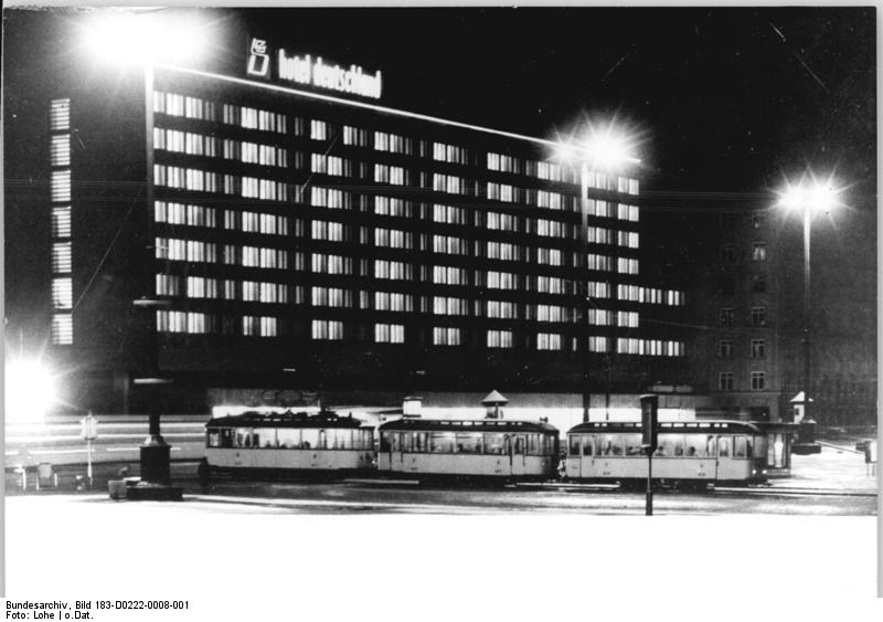 Leipzig, Hotel "Deutschland", Nacht ADN-ZB Lohe Ku-Hö "Hotel Deutschland" (umbenannt in "Interhotel am Ring"), das größte der drei neuerbauten Leipziger Hotels, wurde am 20. Februar 1965 seiner Bestimmung übergeben. 140 Einbett- und 133 Zweibettzimmer sowie 12 Apartements bieten für die Besucher der Messestadt hohen Komfort.